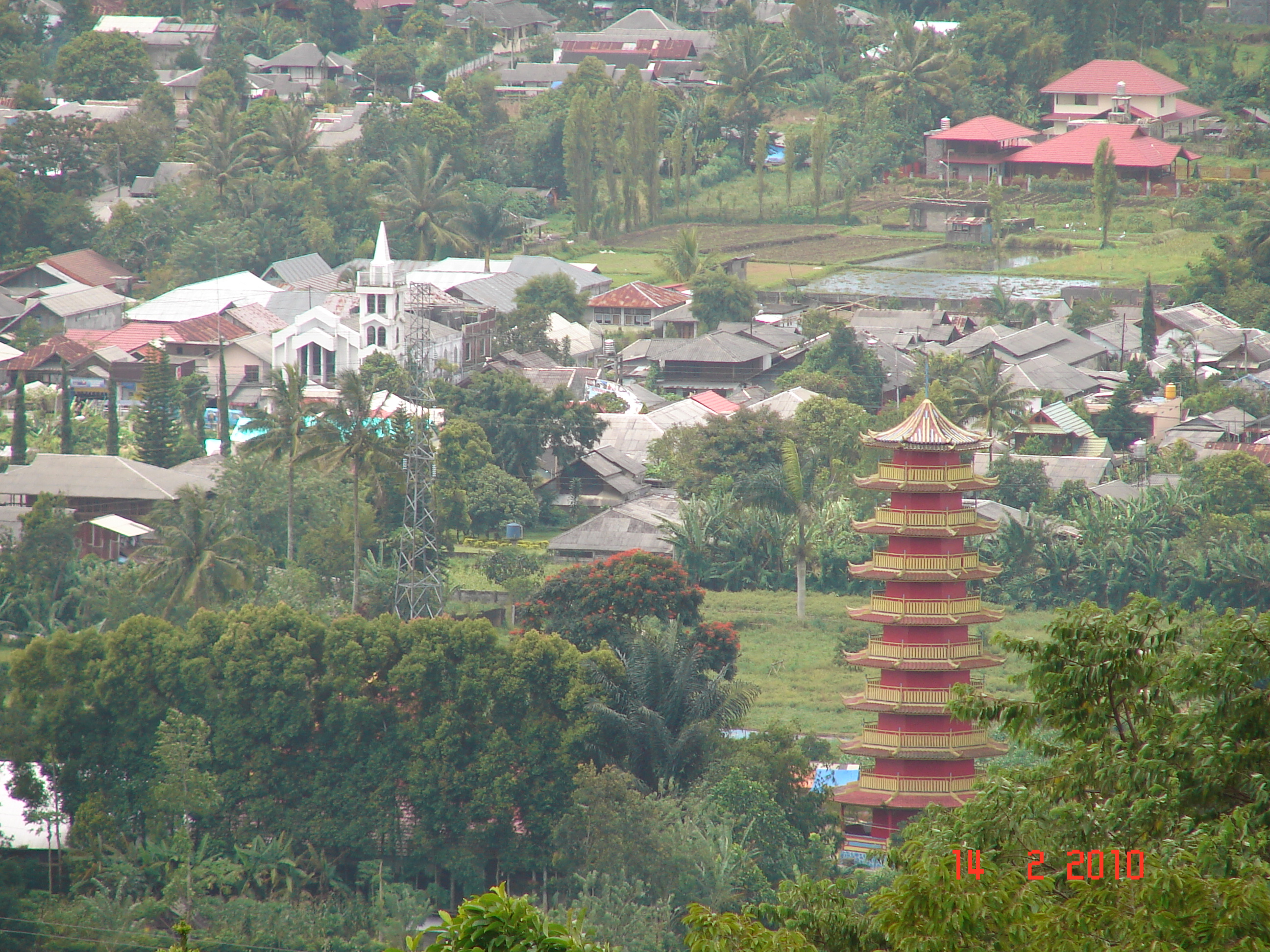 Pagoda